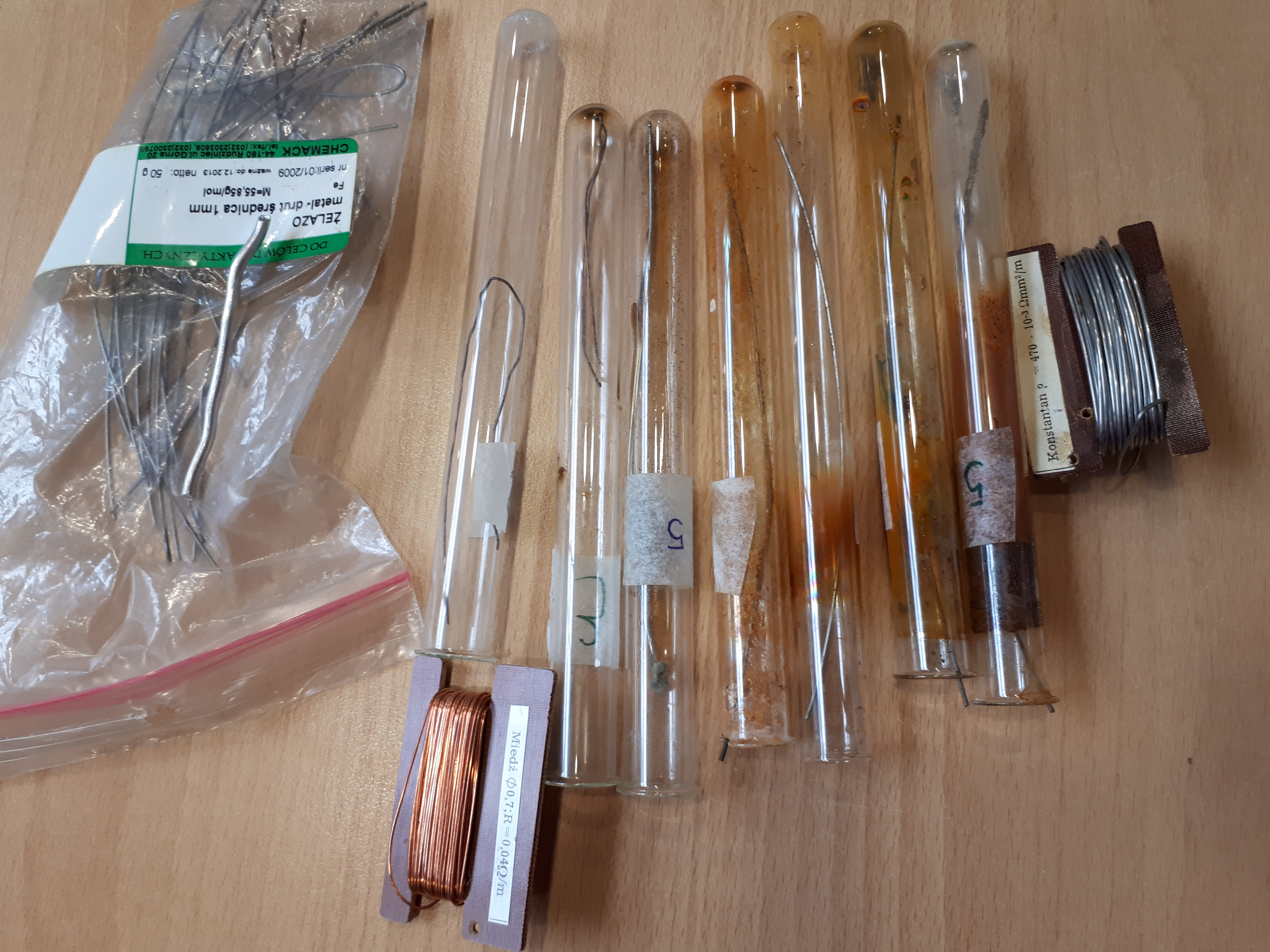 Obserwacja korozji z Magdaleną Osial. Projekt Szkoła bliżej nauki, Centrum Nauki w Warszawie Centrum Nauki Kopernik w Warszawie.